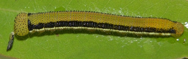 Catopsilia crocale caterpillar